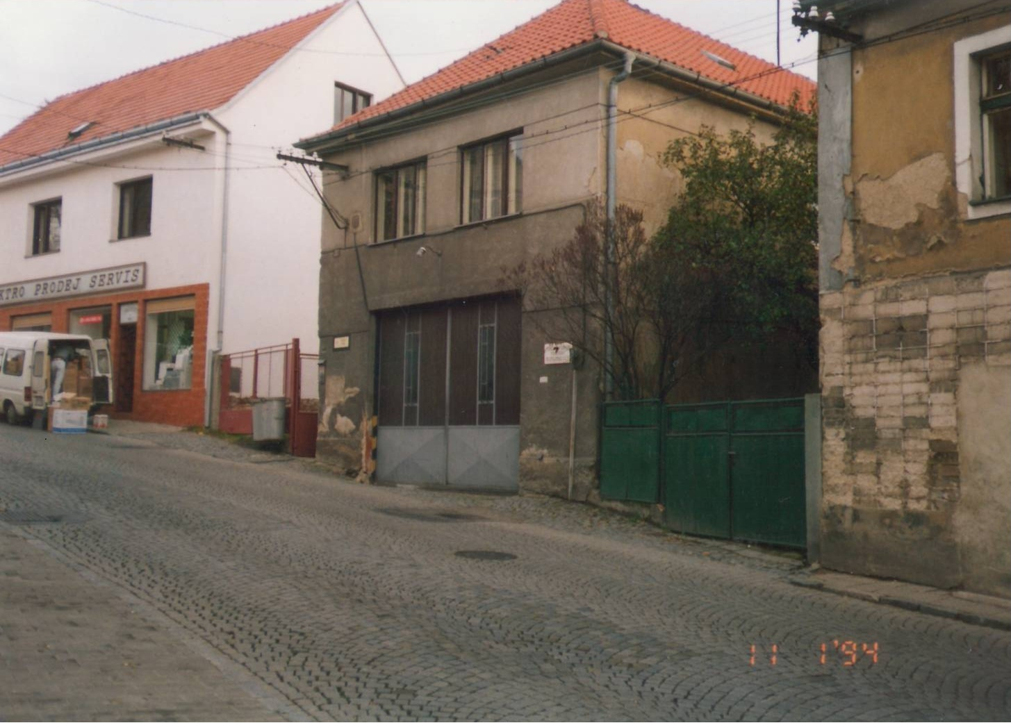 Bývalé sídlo SDH Zruč nad Sázavou